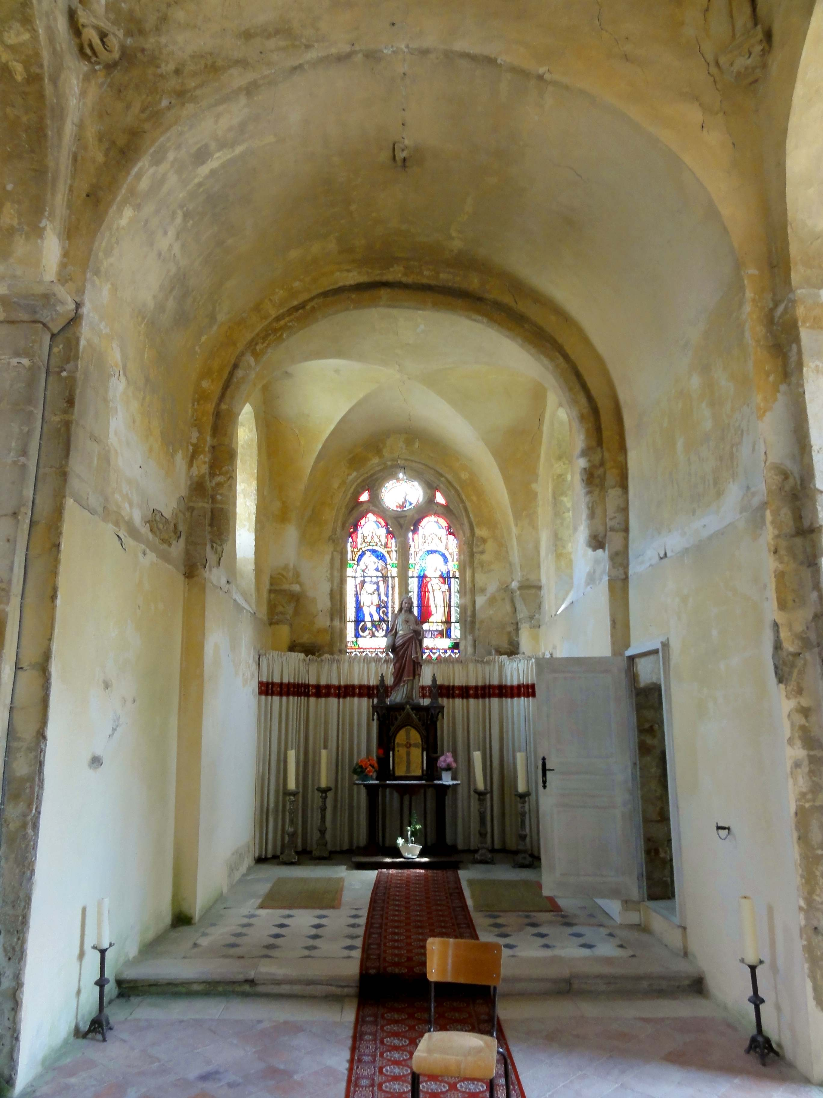 Intérieur de l'église (voir titre).